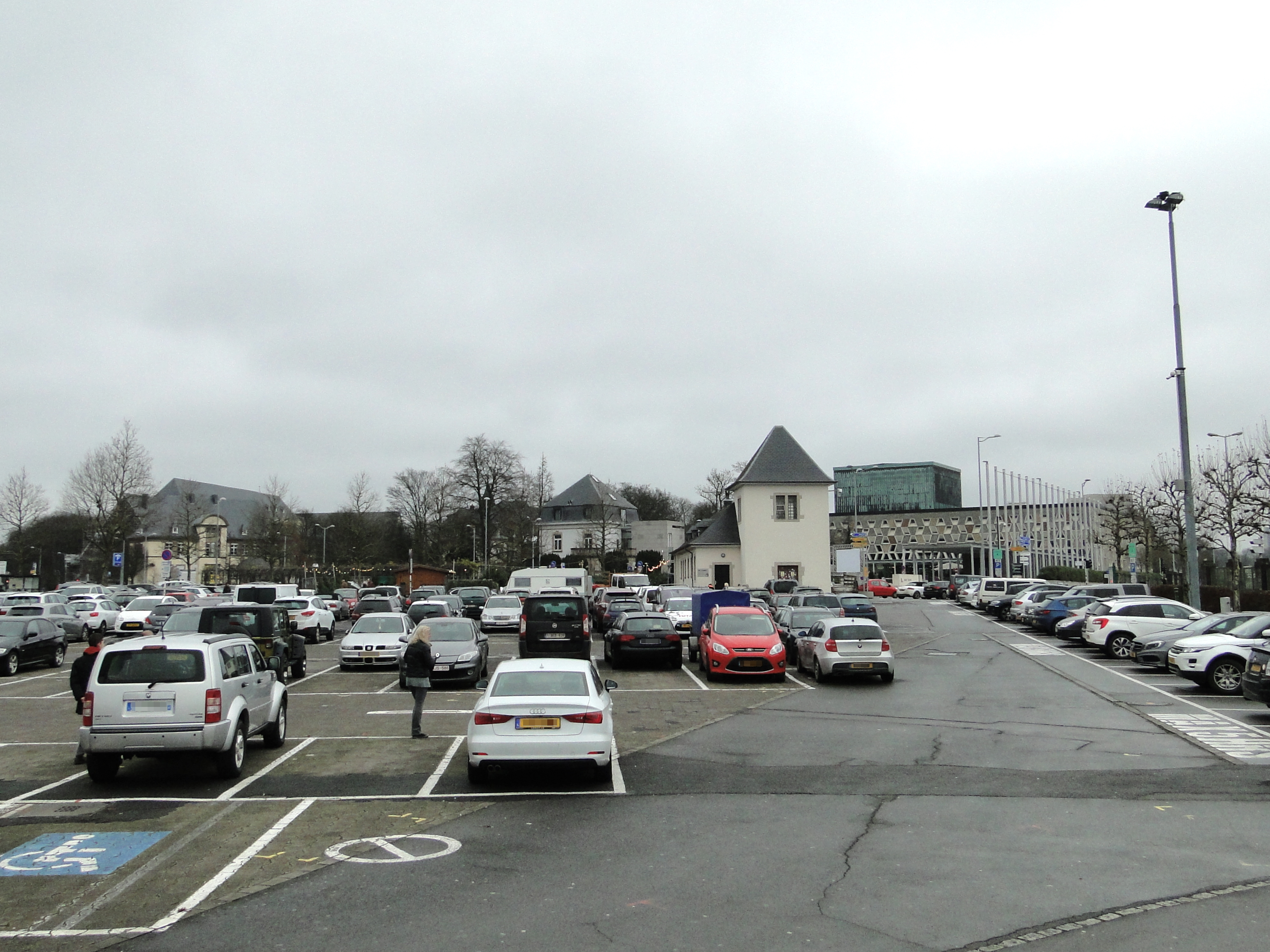 Luxembourg, parking du Glacis.